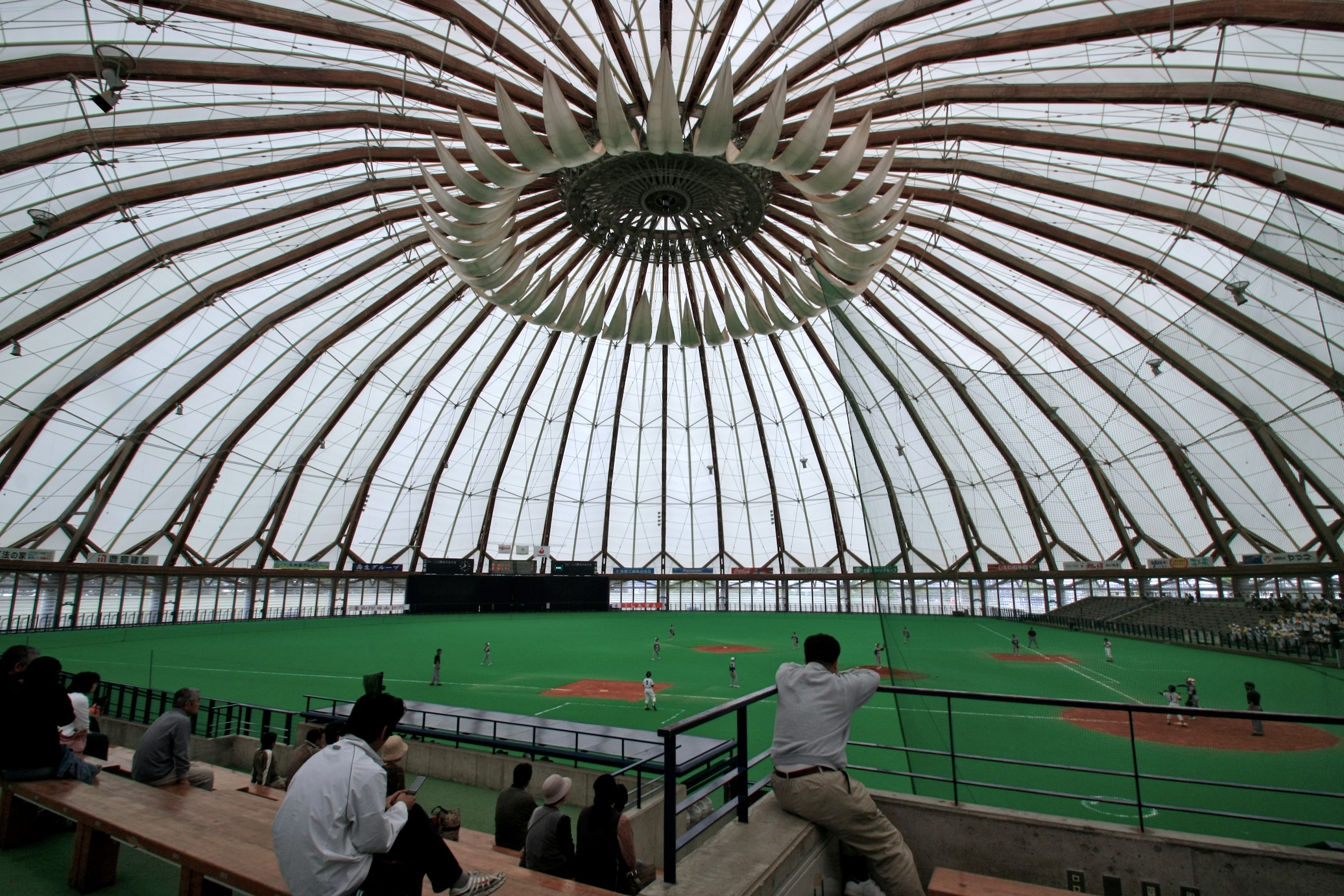 kajima design